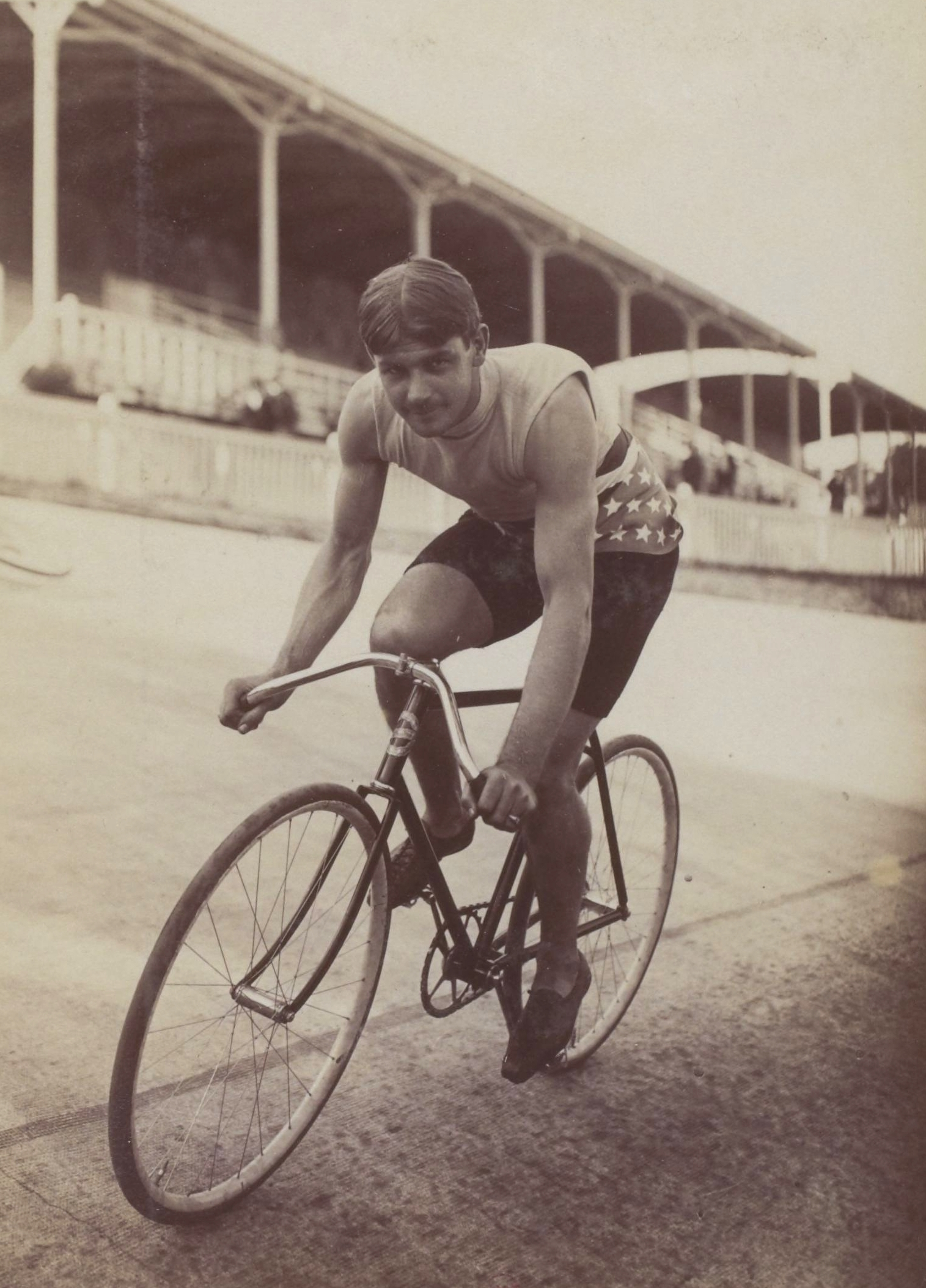 [Collection Jules Beau. Photographie sportive] : T. 12. Années 1899 et 1900 / Jules Beau : F. 3. Mac Farland, américain ; Tom Cooper, américain